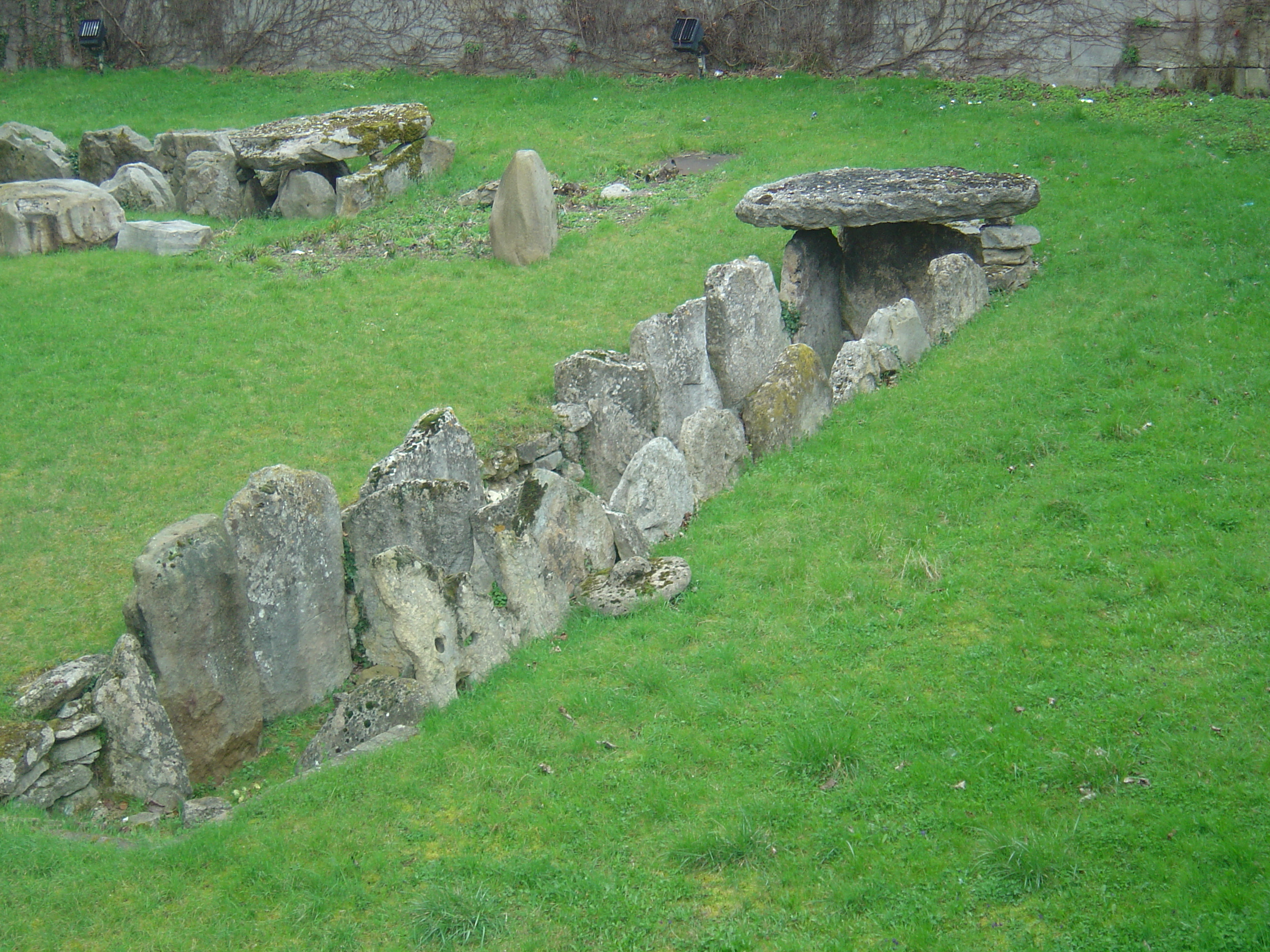 Allée couverte du Trou aux Anglais, déplacée dans les douves du château de St Germain en Laye.